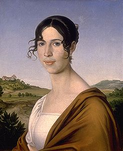 Bildnis einer Unbekannten [im Ammertal bei Tübingen]